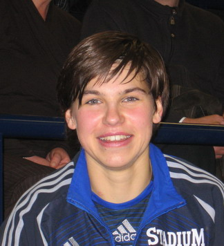 Ariane Hingst